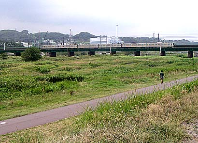 多摩川にかかるJR南武線の橋梁。府中本町駅～南多摩駅間。右が東京都府中市、左が稲城市。